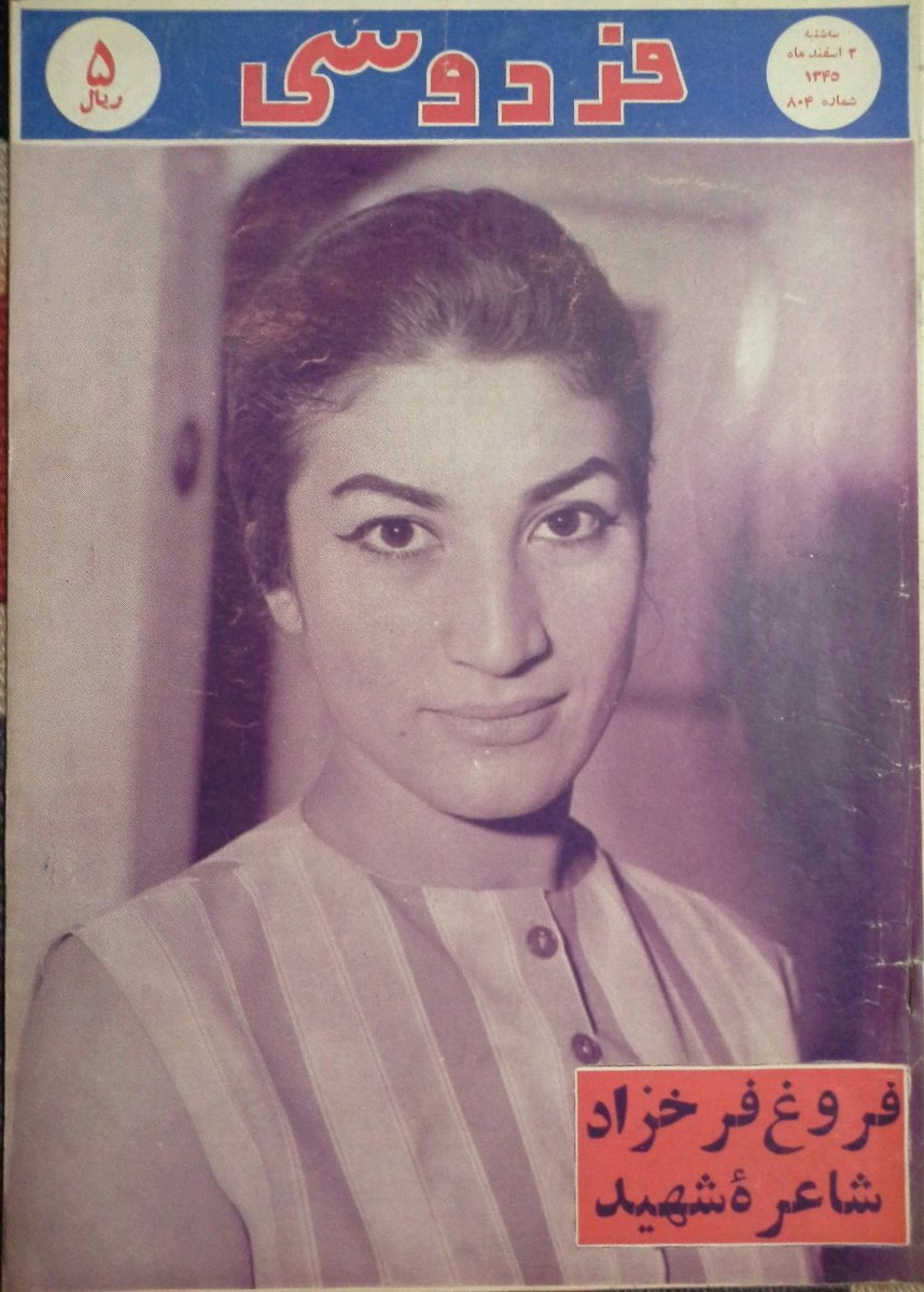 فروغ فرخزاد، روی جلد شمارهٔ ۸۰۴ مجلهٔ فردوسی